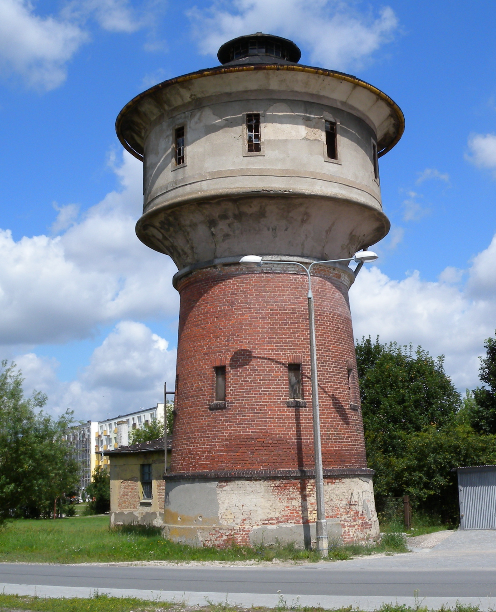 Barcin wieża ciśnień